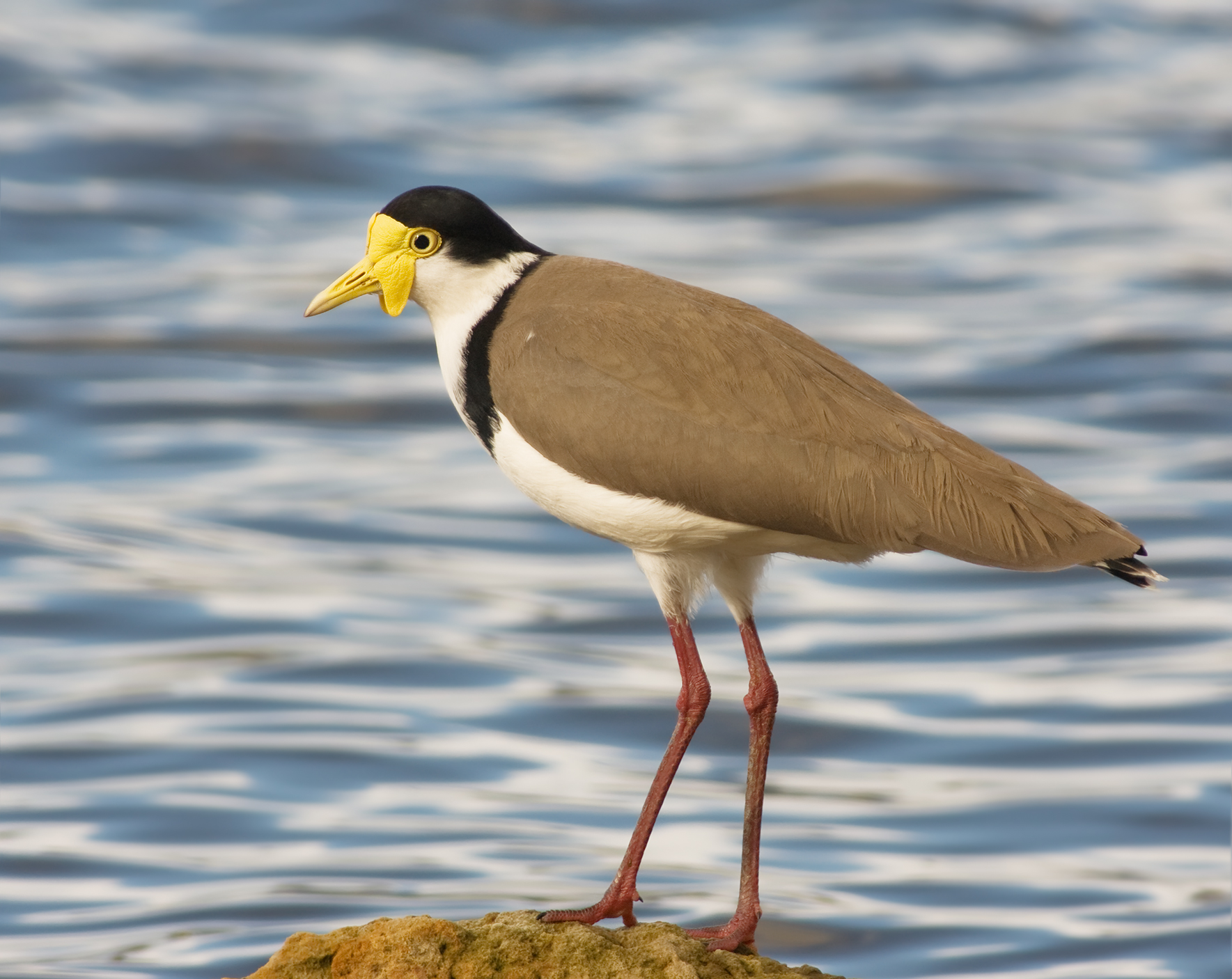 1.2 only